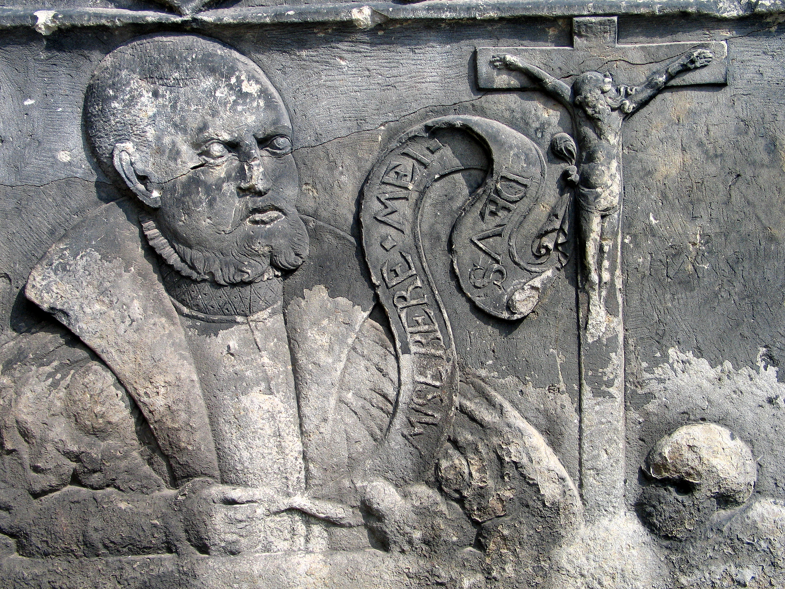 Brustbild (Halbfigur-Relief) des Hofrates und Autors Eberhard von Berckhusen (um 1525-1564) an der südlichen Aussenwand der Marktkirche in Hannover, mit Kruzifix über einer Schädelstätte ...